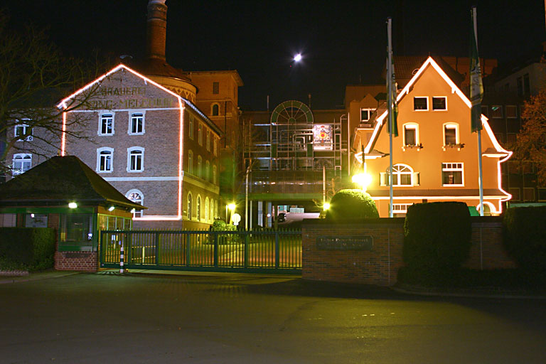 Licher Privatbrauereiin Lich